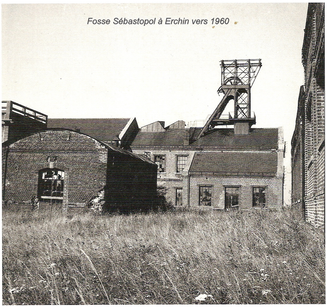 Ancienne fosse Sébastopol à Erchin aujourd'hui disparue